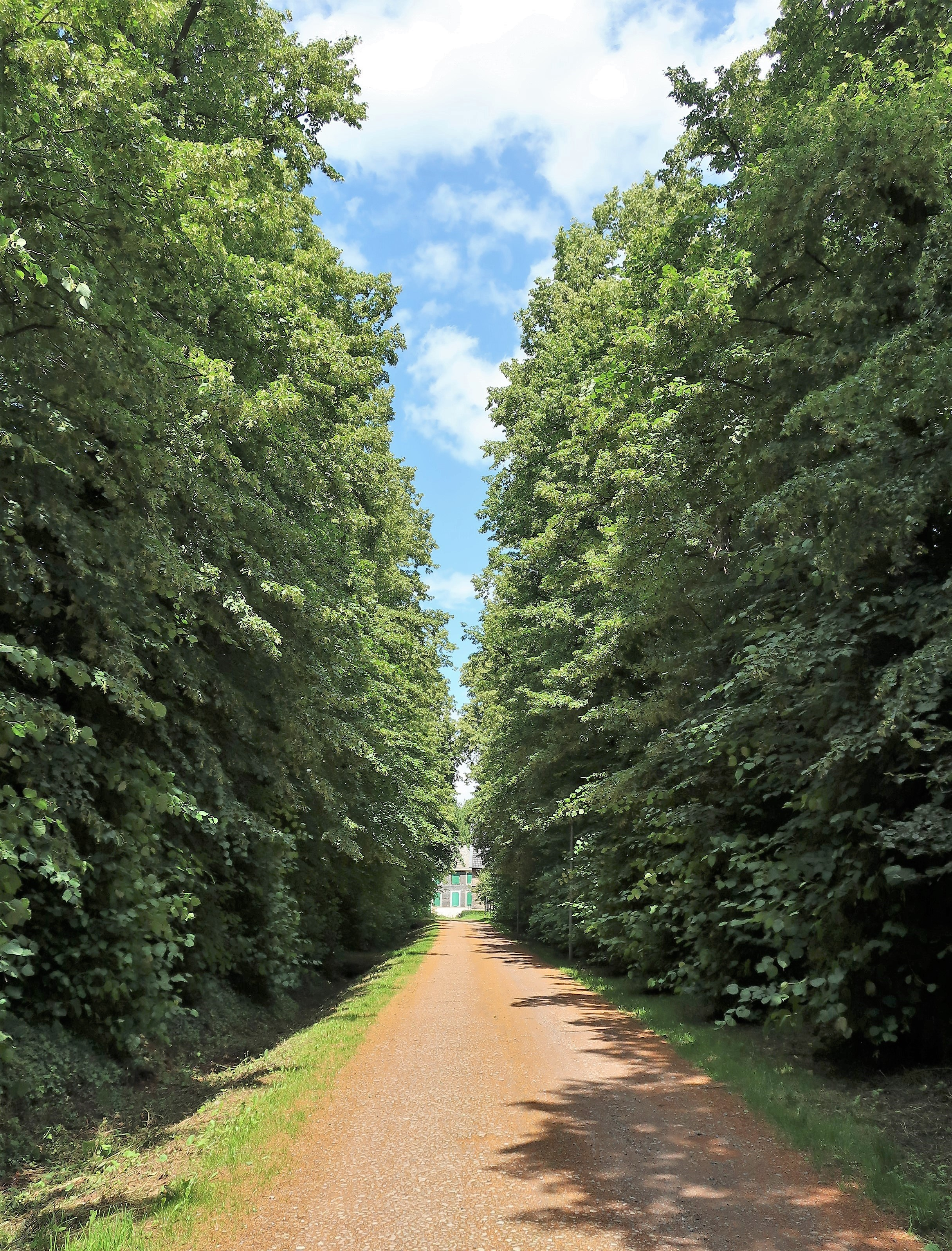 Geschützte Lindenallee zum Haus Harkorten in Hagen. Länge: 138 m (Alleenkataster NRW AL-HA-0004). Auch geschützter Landschaftsbestandteil „Haus Harkorten“. Es handelt sich um eine Allee, bestehend aus 60 Linden mit einem Stammumfang von ca. 150 cm, ca. 18 m Höhe und ca. 8 m Kronendurchmesser entlang der Zufahrt zum Haus Harkorten.